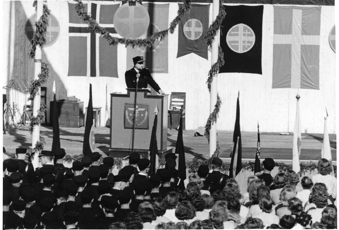 Borgarting i Sarpsborg. Datering: 1942/07. RA/RAFA-3309/U 41A/3 /41-3-2 img287 Nasjonal Samling, forkortet NS, var et norsk politisk parti som ble grunnlagt av Vidkun Quisling i 1933 og ble oppløst ved frigjøringa i 1945. Partiet la seg etterhvert nært opp mot nasjonalsosialismens ideologi og ble støtteorganisasjon for den tyske okkupasjonsmakta i Norge under andre verdenskrig.